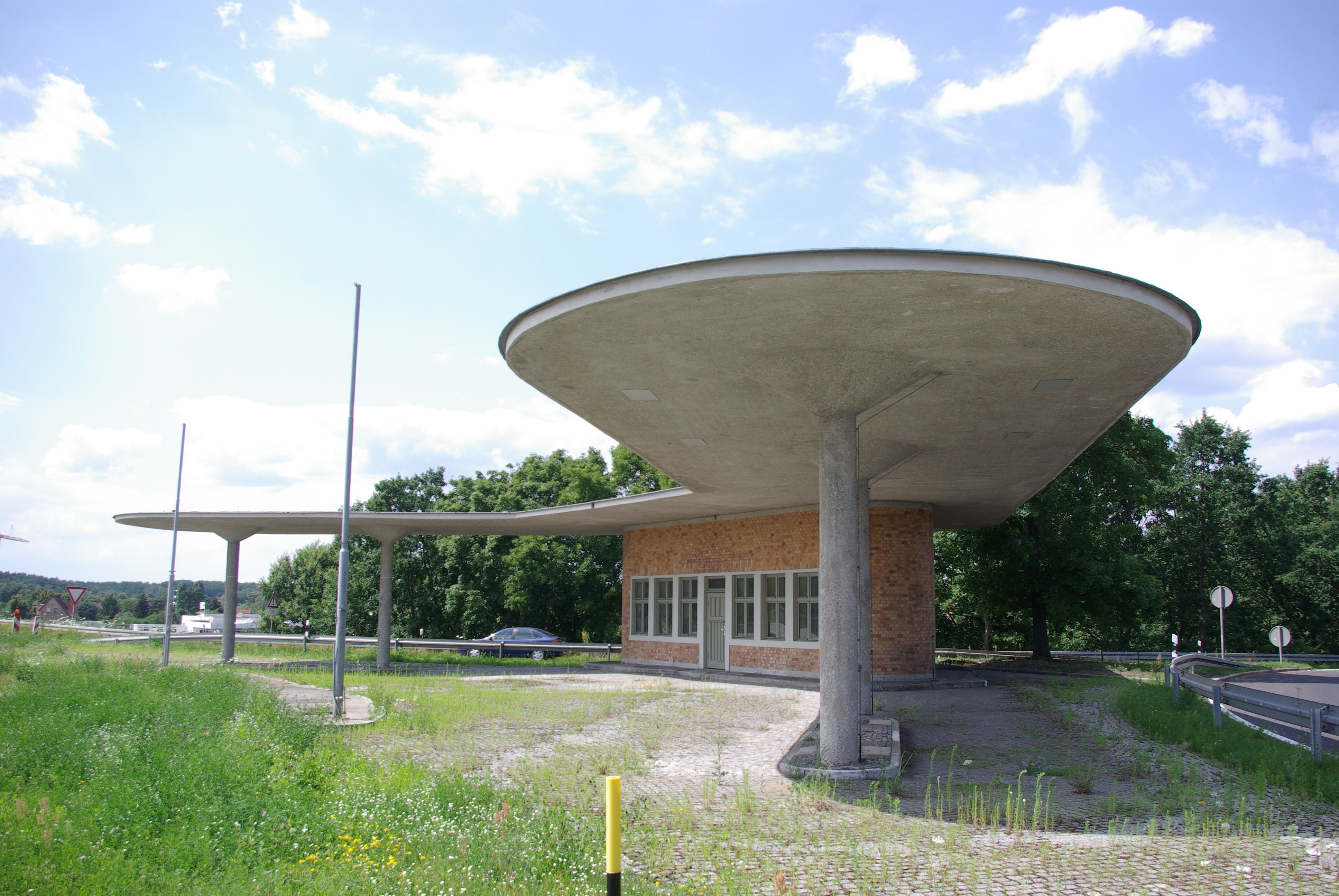 Die Autobahn A12 in Brandenburg im Bereich Fürstenwalde/Spree. Die alte Tankstelle an der nördlichen Ausfahrt steht unter Denkmalschutz. Der Blick ist von Südosten auf das Dach.